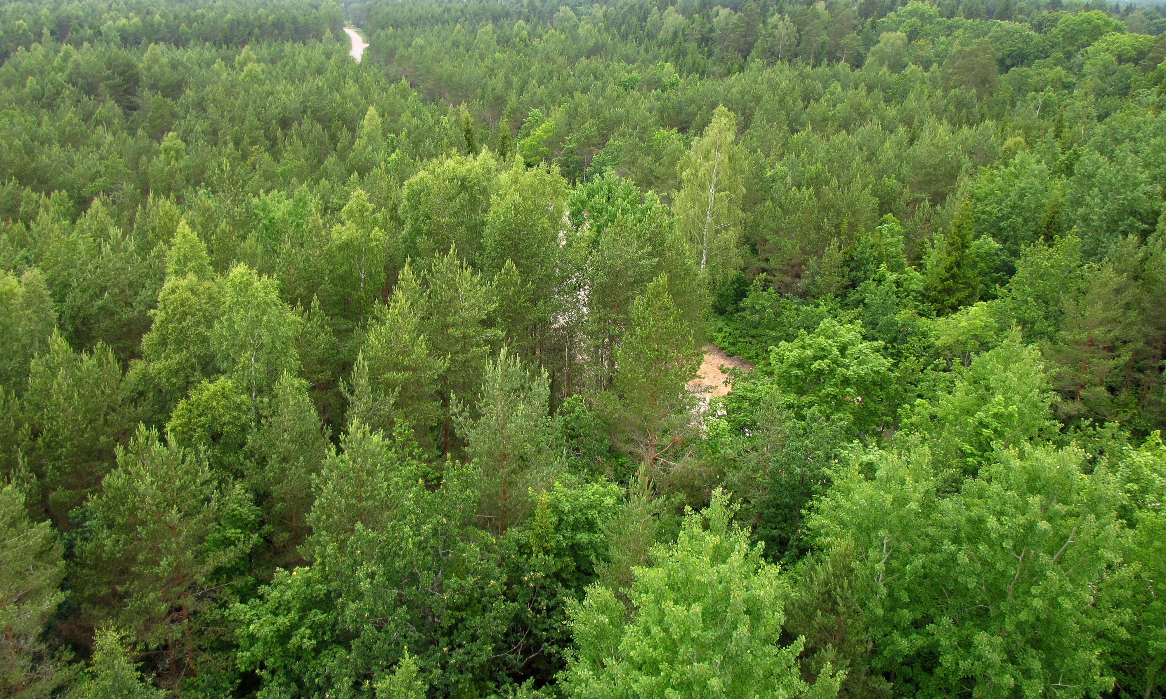 Viidumäe looduskaitseala